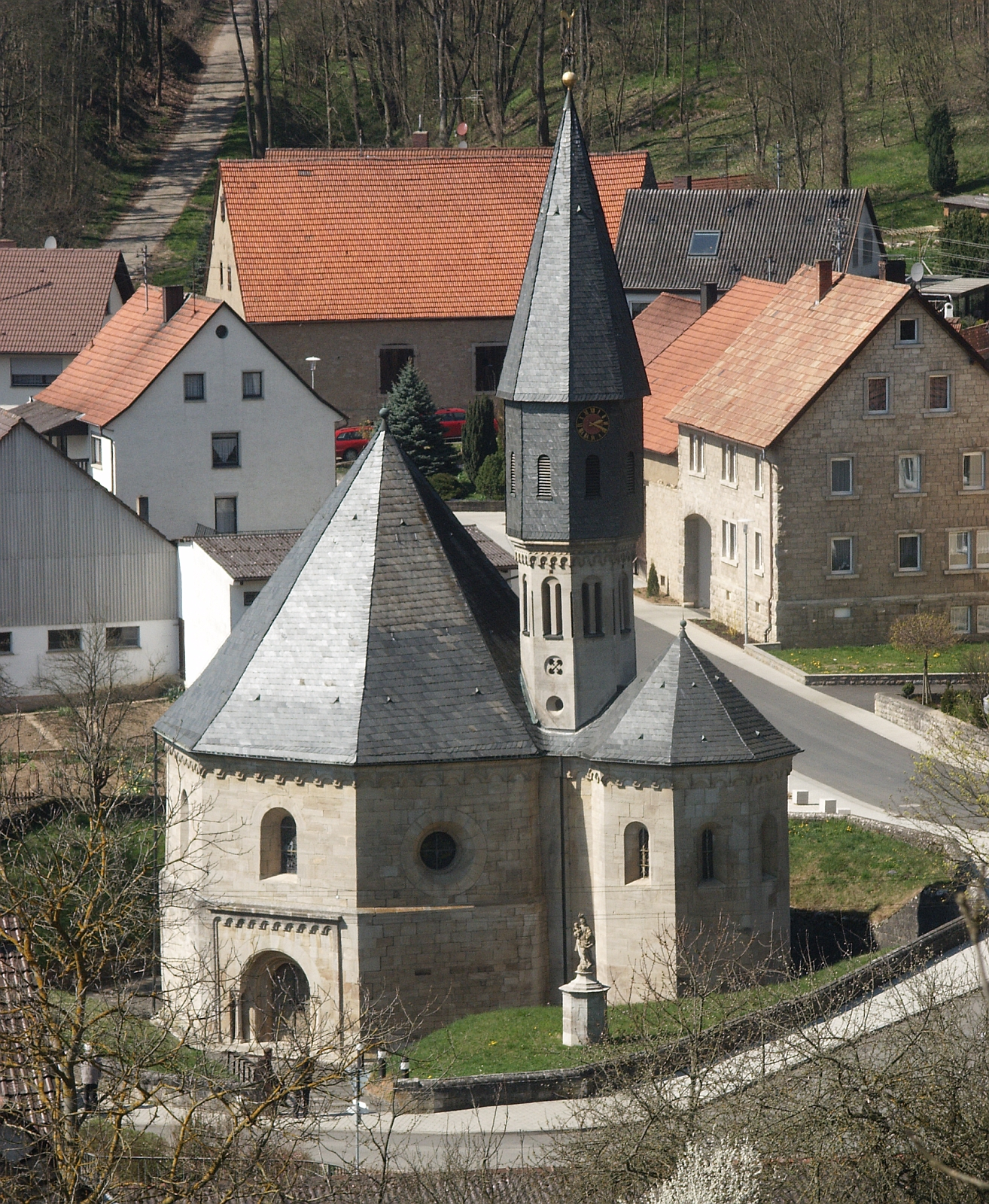 St. Achatius Kapelle, Grünsfeldhausen, Germany